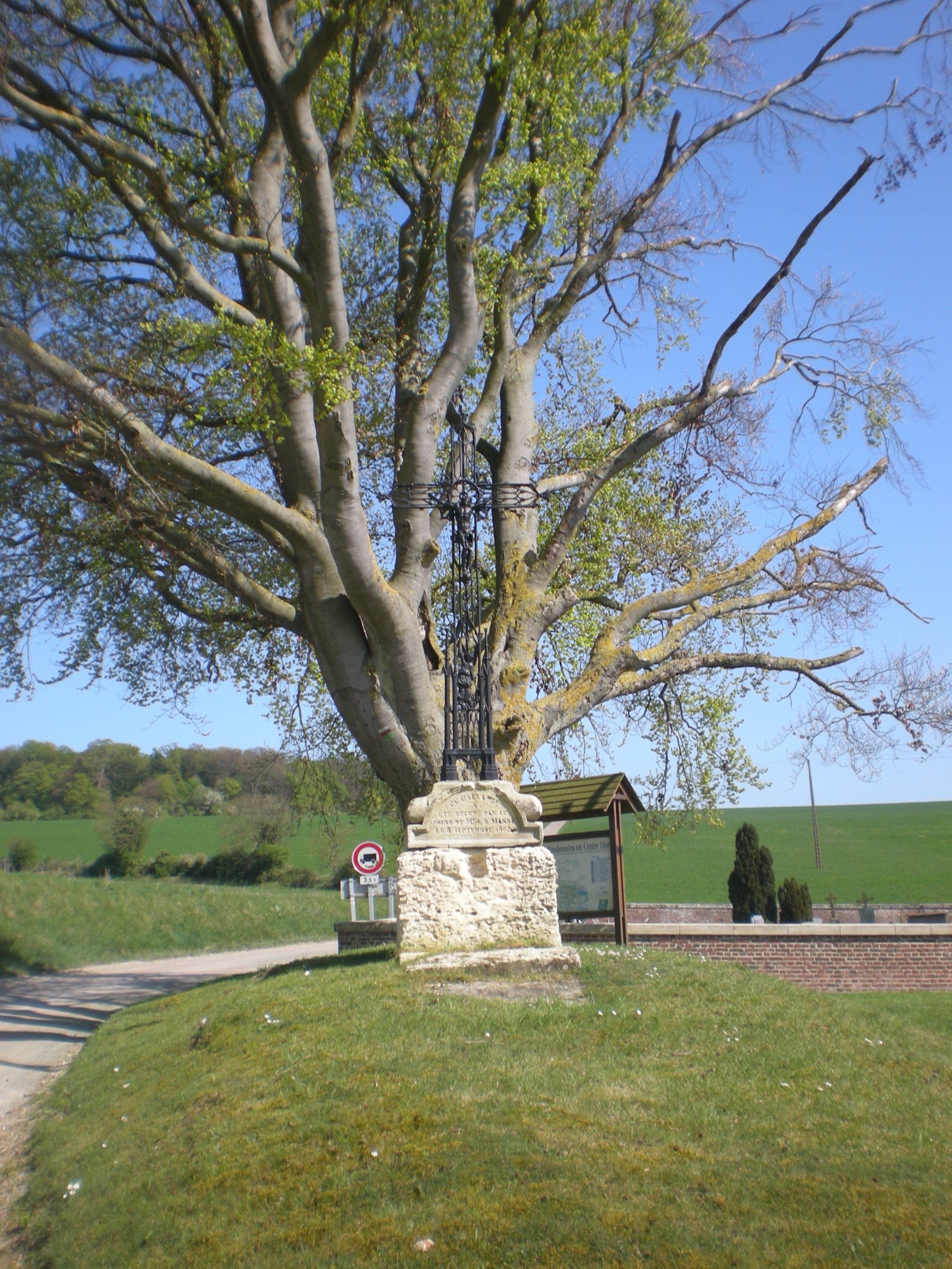 croix à lamécourt (oise)